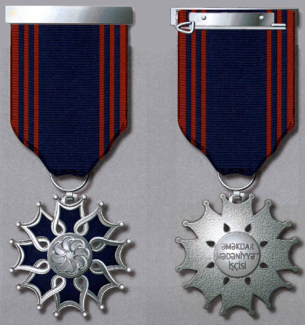 “Əməkdar mədəniyyət işçisi” fəxri adının döş nişanı